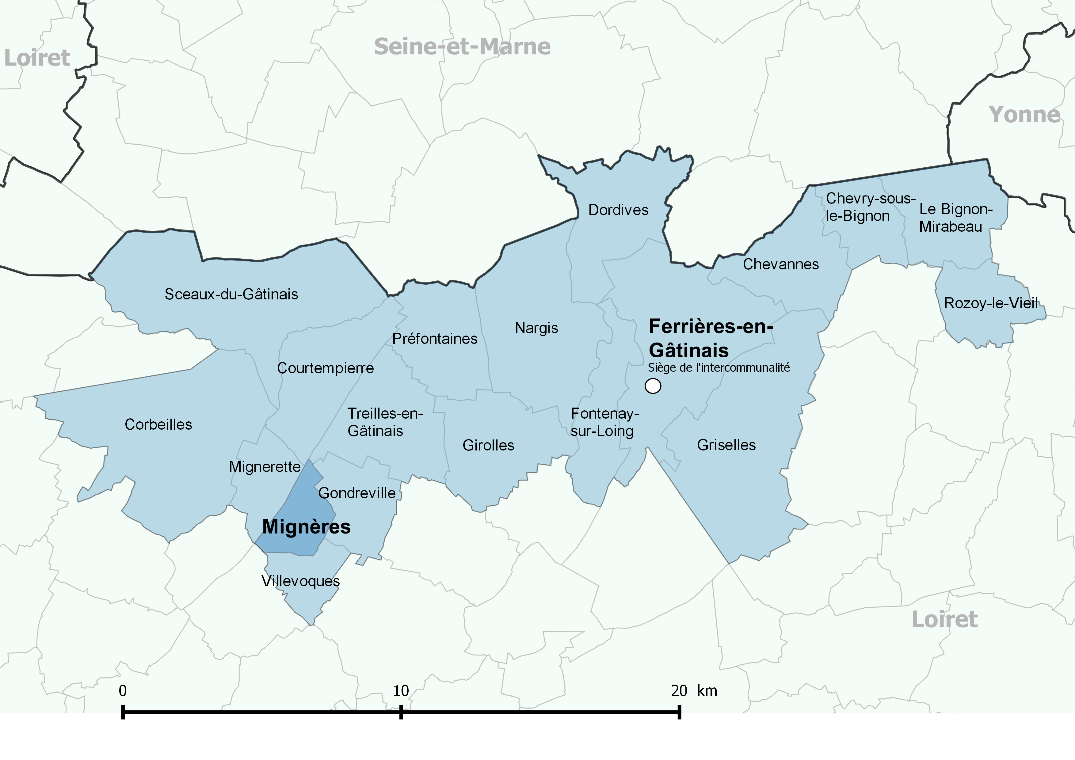 Périmètre de la communauté de communes des Quatre Vallées (Loiret) - Positionnement de la commune de Mignères.